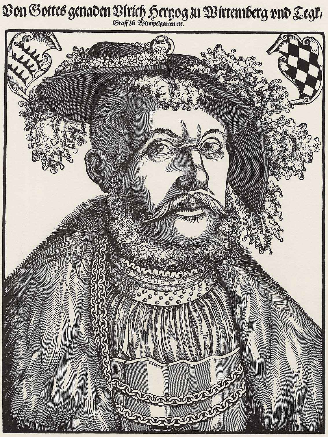 Porträt des Herzogs Ulrich von Württemberg und Teck [1] Technik: Holzschnitt, Maße: 35,1 × 26,1 cm, Sammlung: Staatliche Kunstsammlungen Dresden, Kupferstich-Kabinett